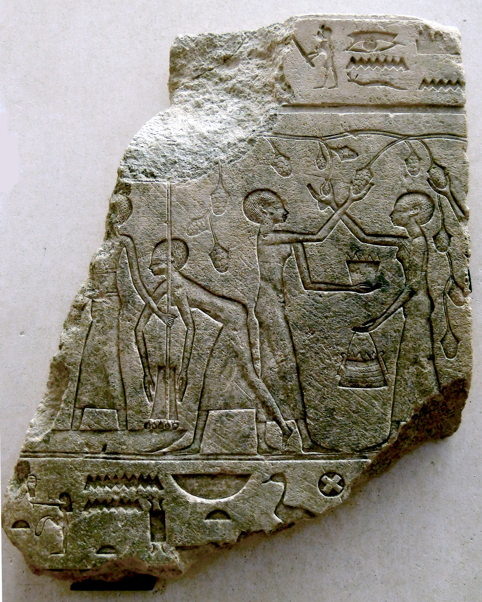 Vendanges - Sous une vigne en hautain deux femmes cueillent les grappes de raisin, portées au pressoir où une autre les foule aux pieds.